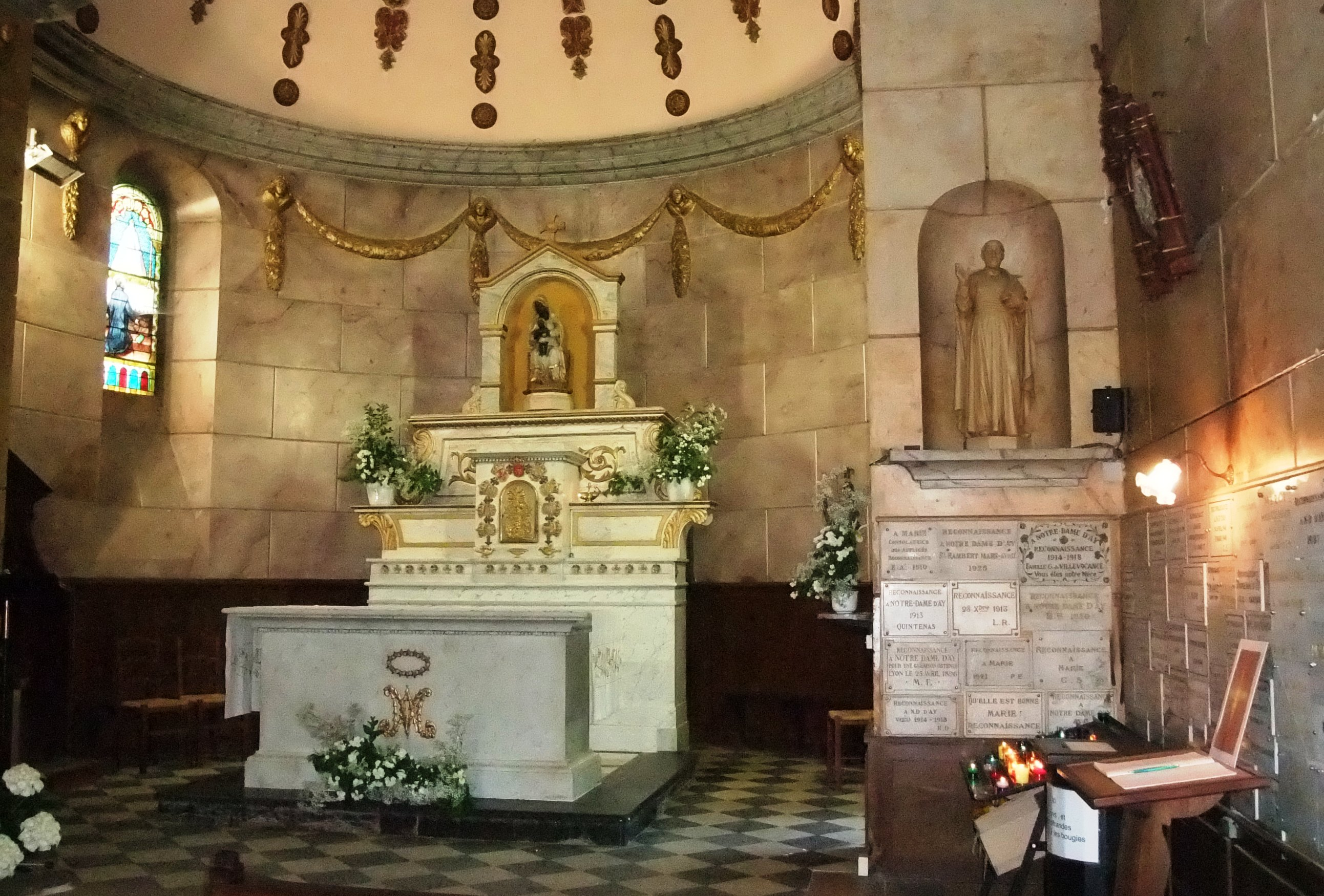 Sanctuaire Notre Dame d'Ay choeur